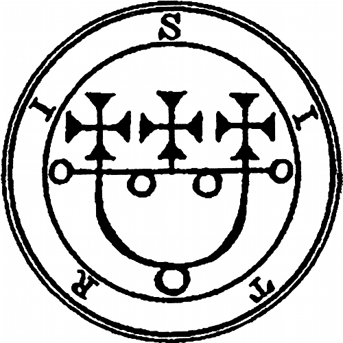 Le sceau de Sitri